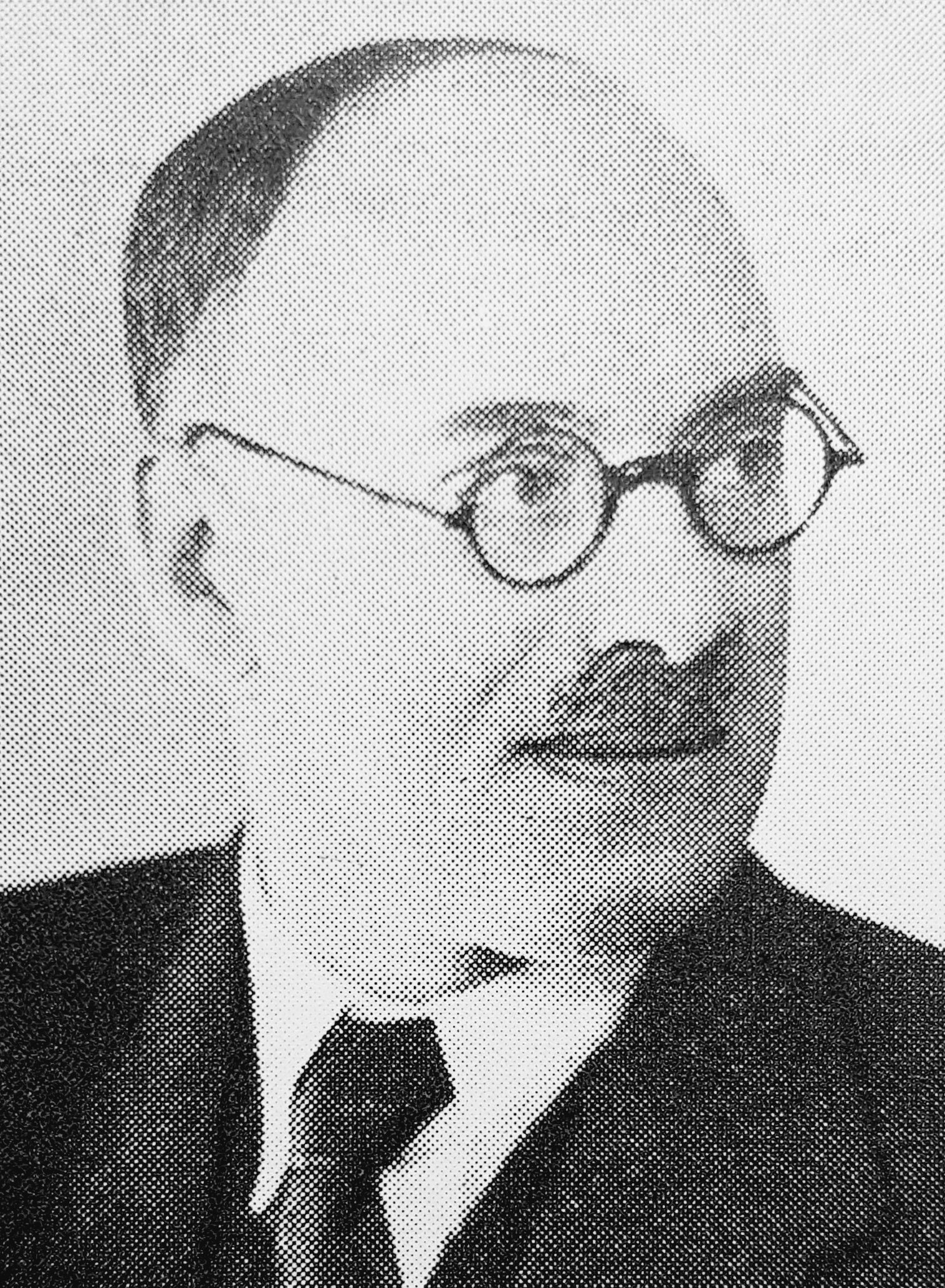 Ernst Dittmer